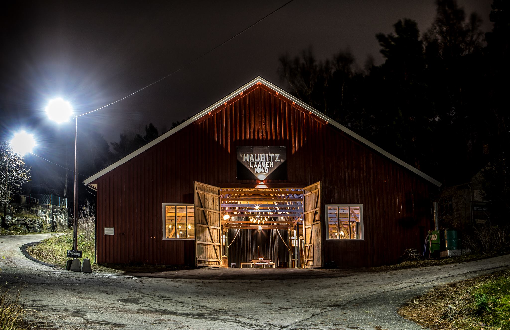 Haubitz Laaven. Bygget av tyskerene i 1940. Kristiansands nye storstue på toppen av Odderøya.